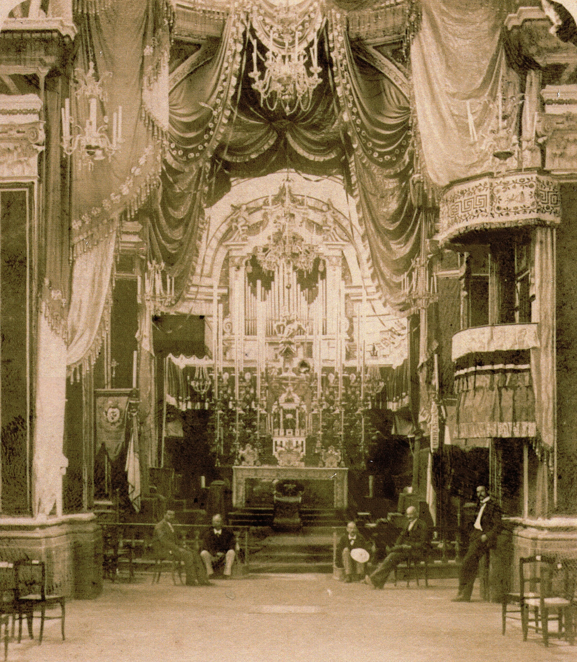 L'immagine, scattata il 25 luglio 1900, è probabilmente l'unica esistente che raffigura l'organo Nachini/Paoli (1747-1862) incastonato in un sontuoso addobbo realizzato per la solennità patronale.